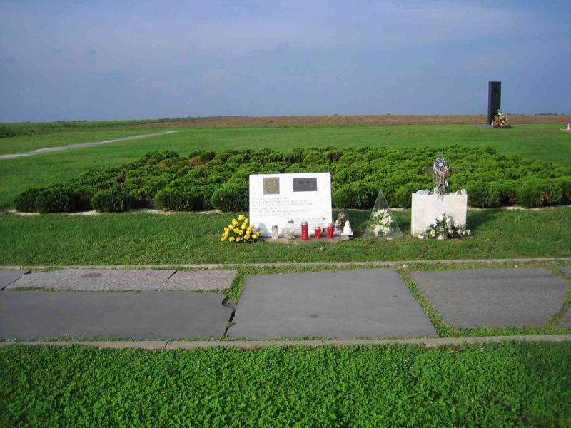 Gedenkstätte Ovcara